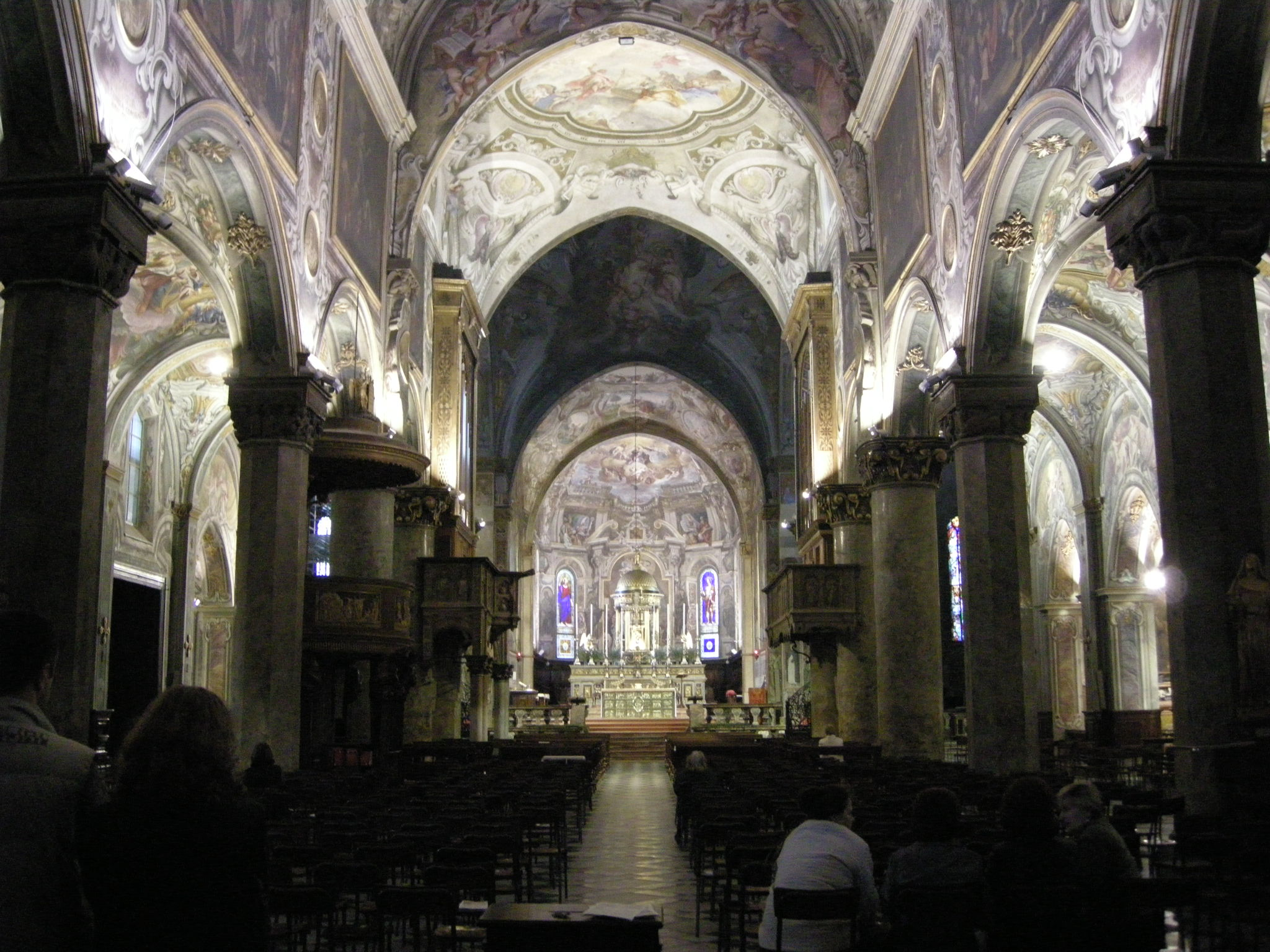 Duomo di monza, interno